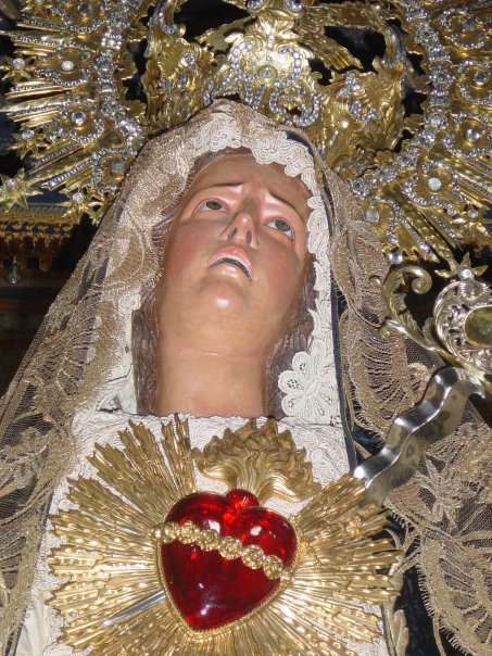 la dolorosa. Semana Santa de Popayán